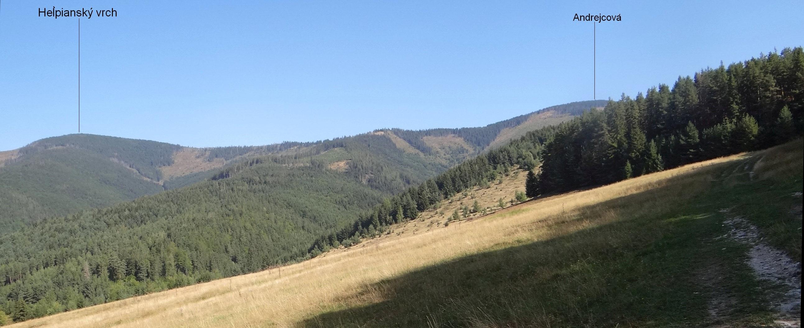 Widok od południowej strony na grań ze szczytem Andrejcová